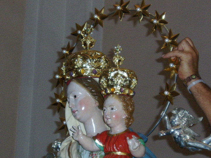 Statua di Mamma Nostra (Particolare). Incoronazione nel primo giorno della festa. 2